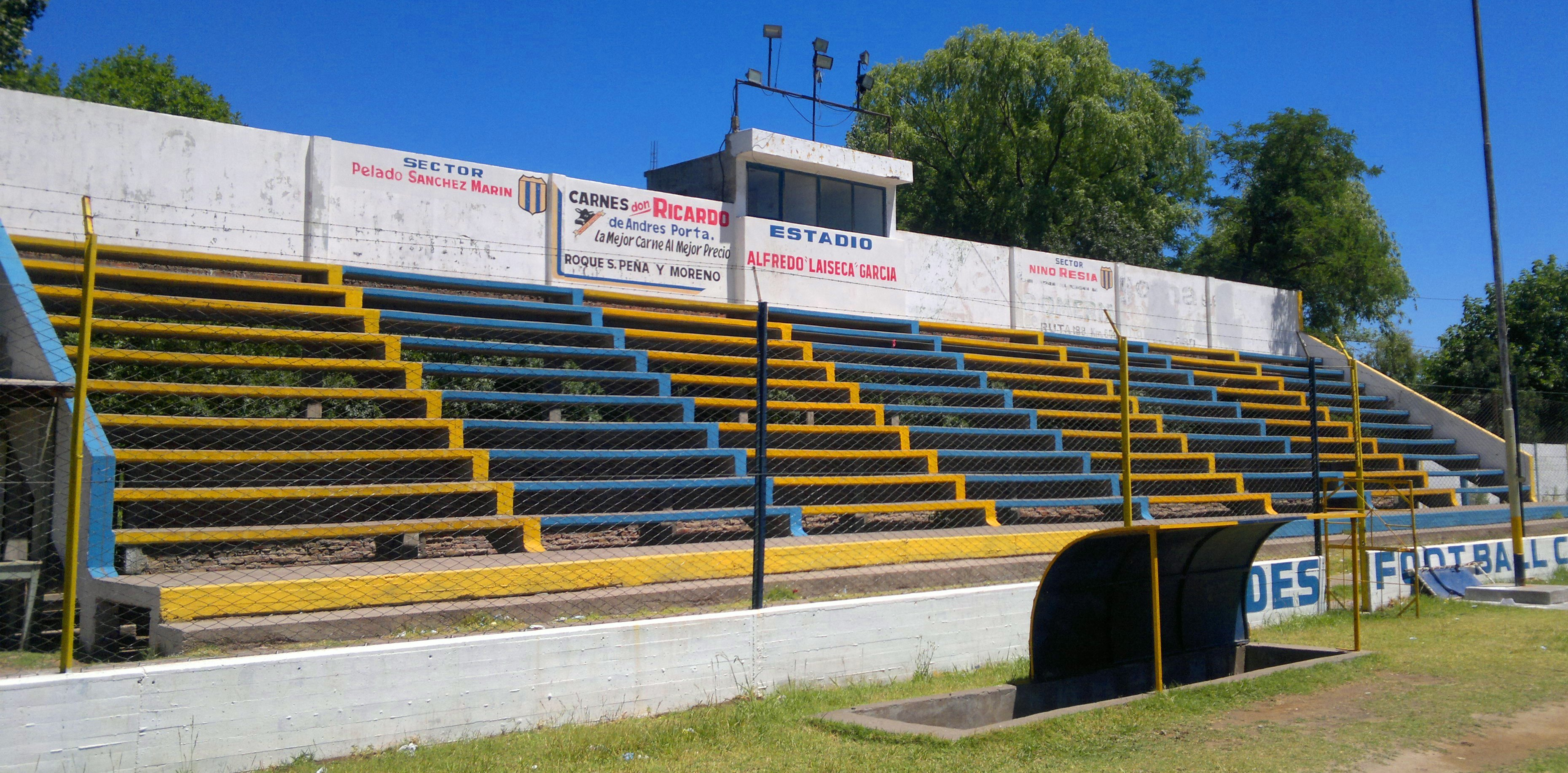 Platea A.F.C.